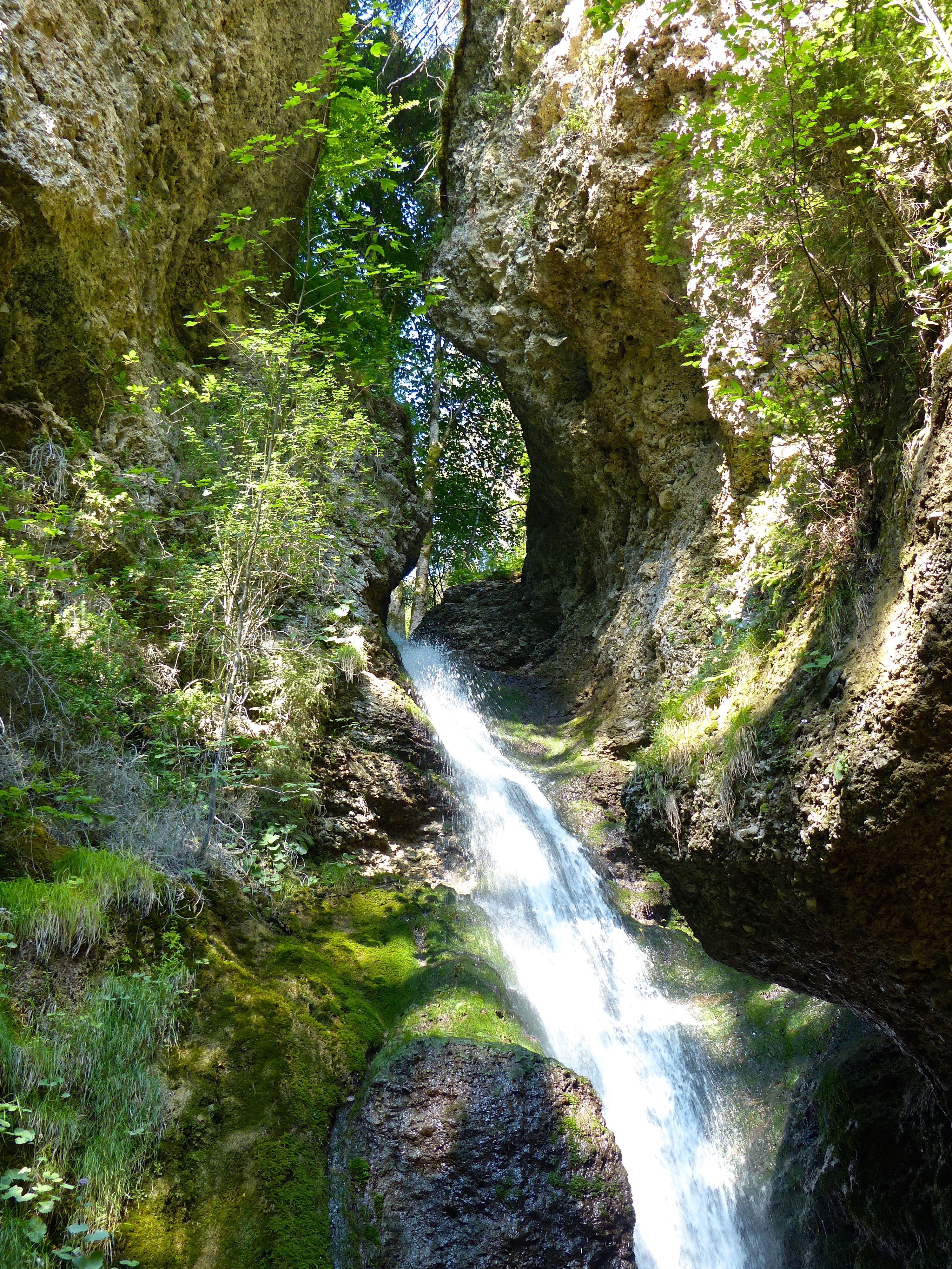 Geotop Wasserfall Hinang: Kalktuffbildungen am Wasserfall